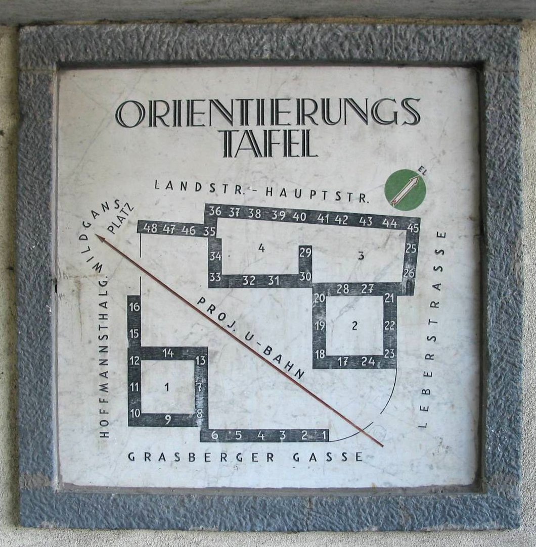 de: Tafel im Wildganshof, Wien 3 en: map inside Wilganshof, Vienna 3